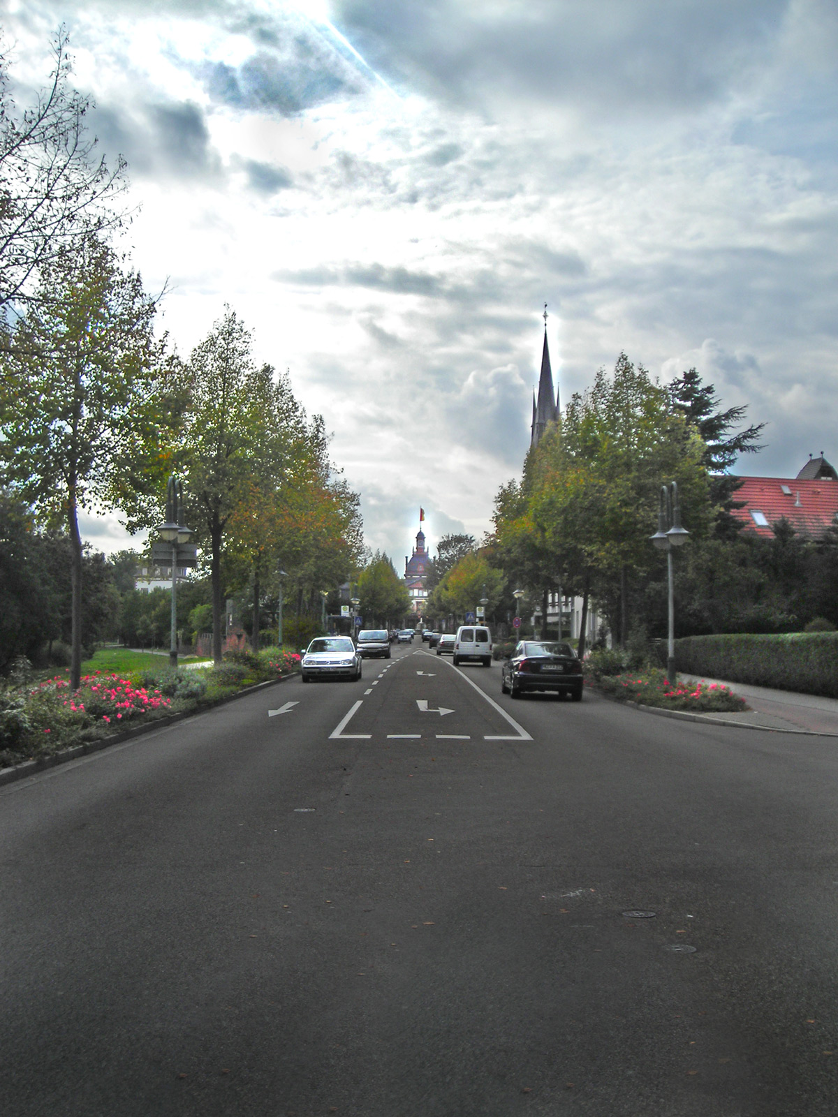 Phillipsruher Allee in Hanau; photographiert auf ungefährer Höhe des Olof-Palme Hauses in Richtung Schloss Philippsruhe